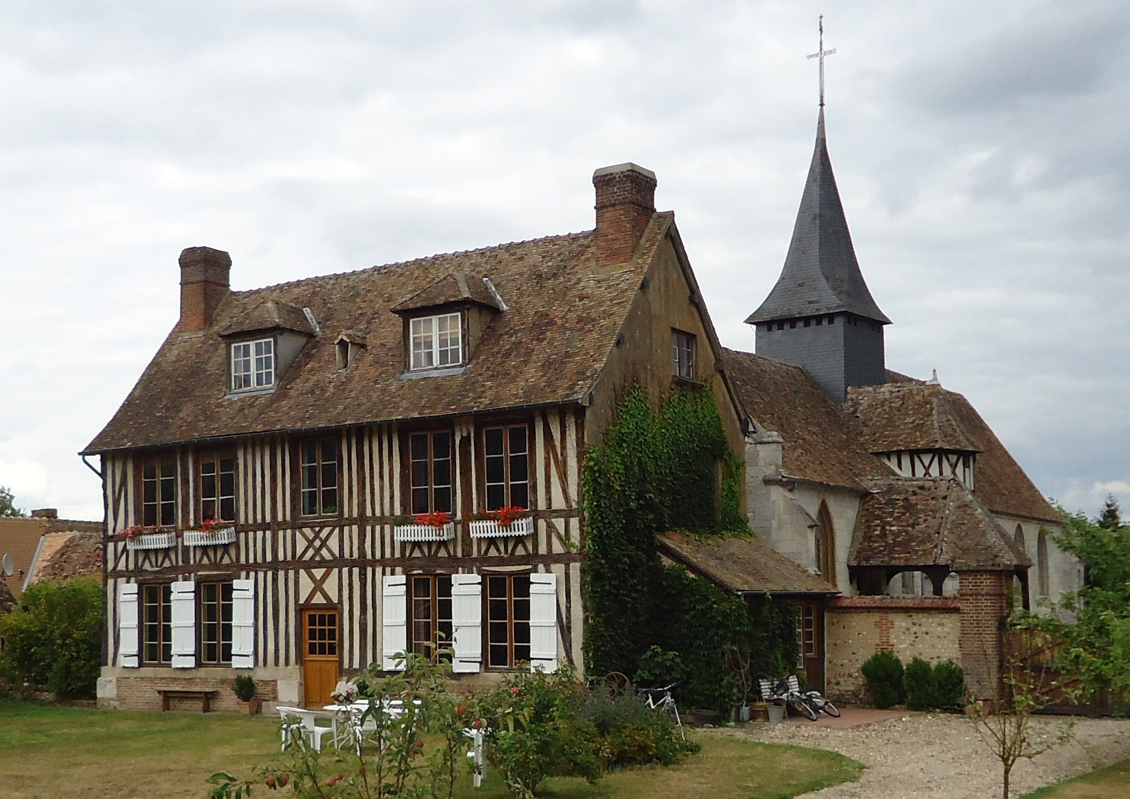 Pinterville - Presbytère XVIIIème.